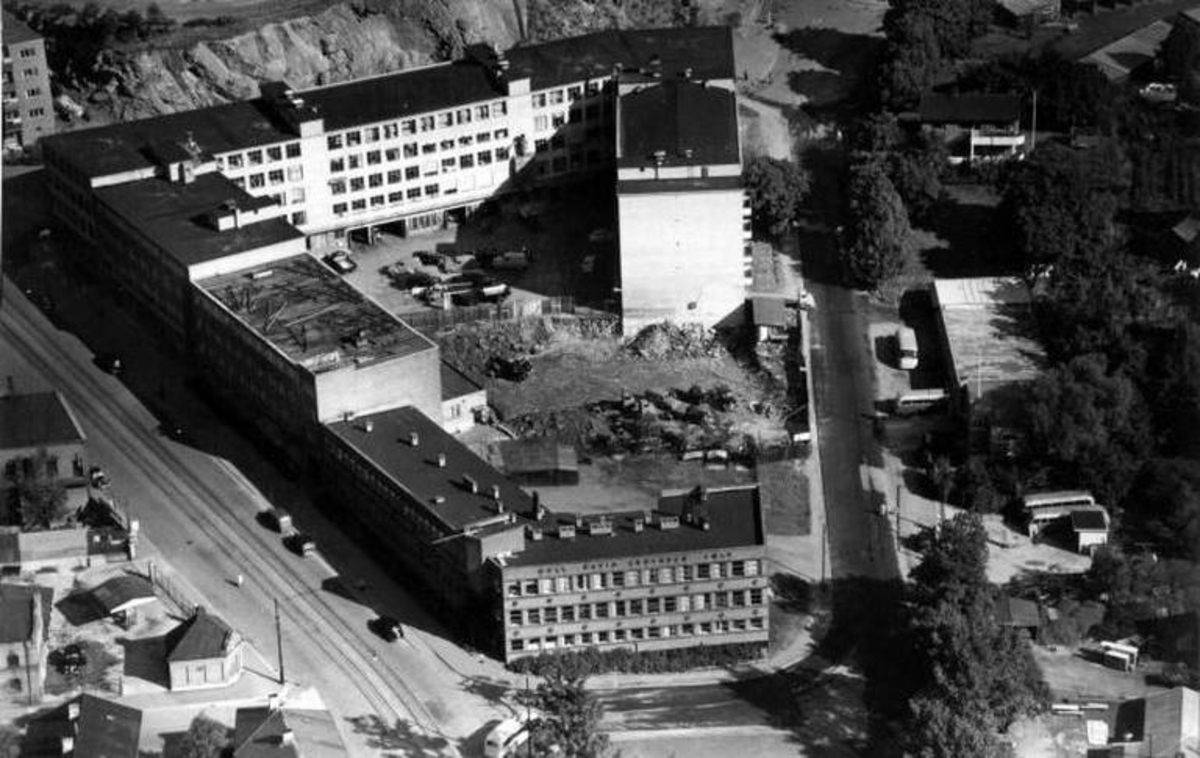 Kvartalet mellom Trondheimsveien og Sinsenveien i Oslo, med David-Andersens verksted i front, 1951